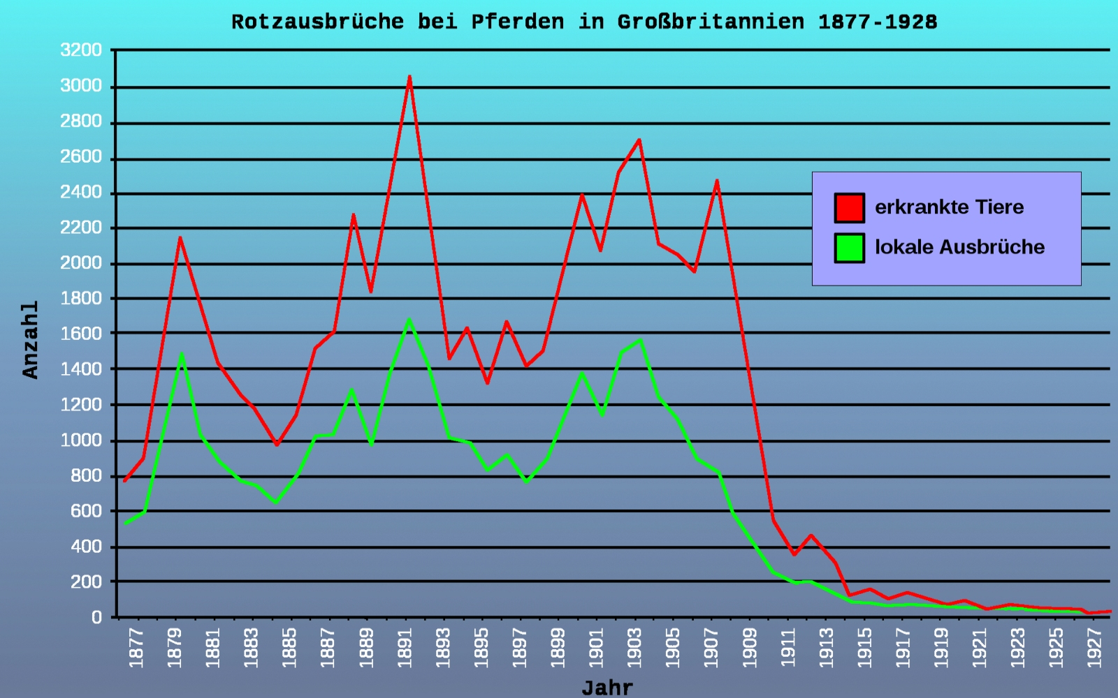 Ausbrüche und Fallzahlen von Rotz beim Pferd in Großbritannien zwischen 1877 und 1928